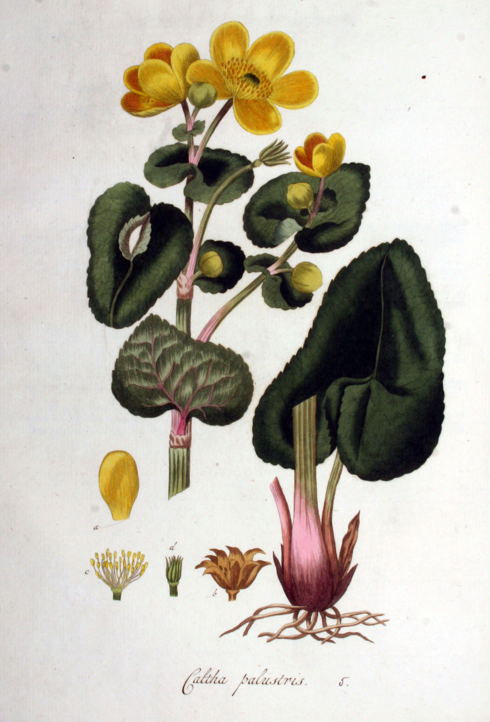 Caltha palustris L.